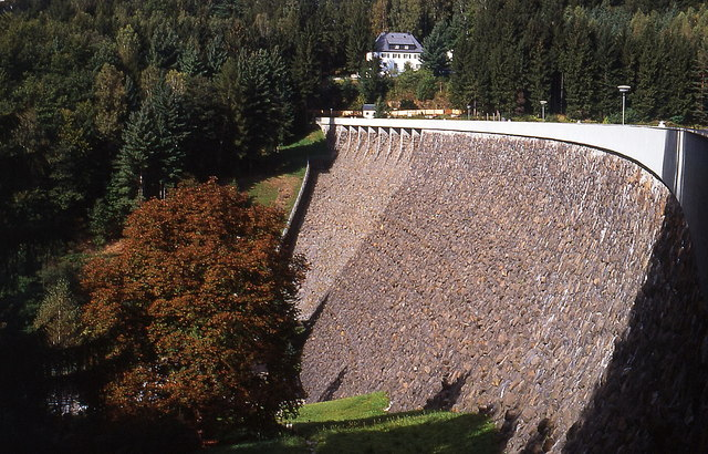 Talsperre Saidenbach (Reservoir Saidenbach)